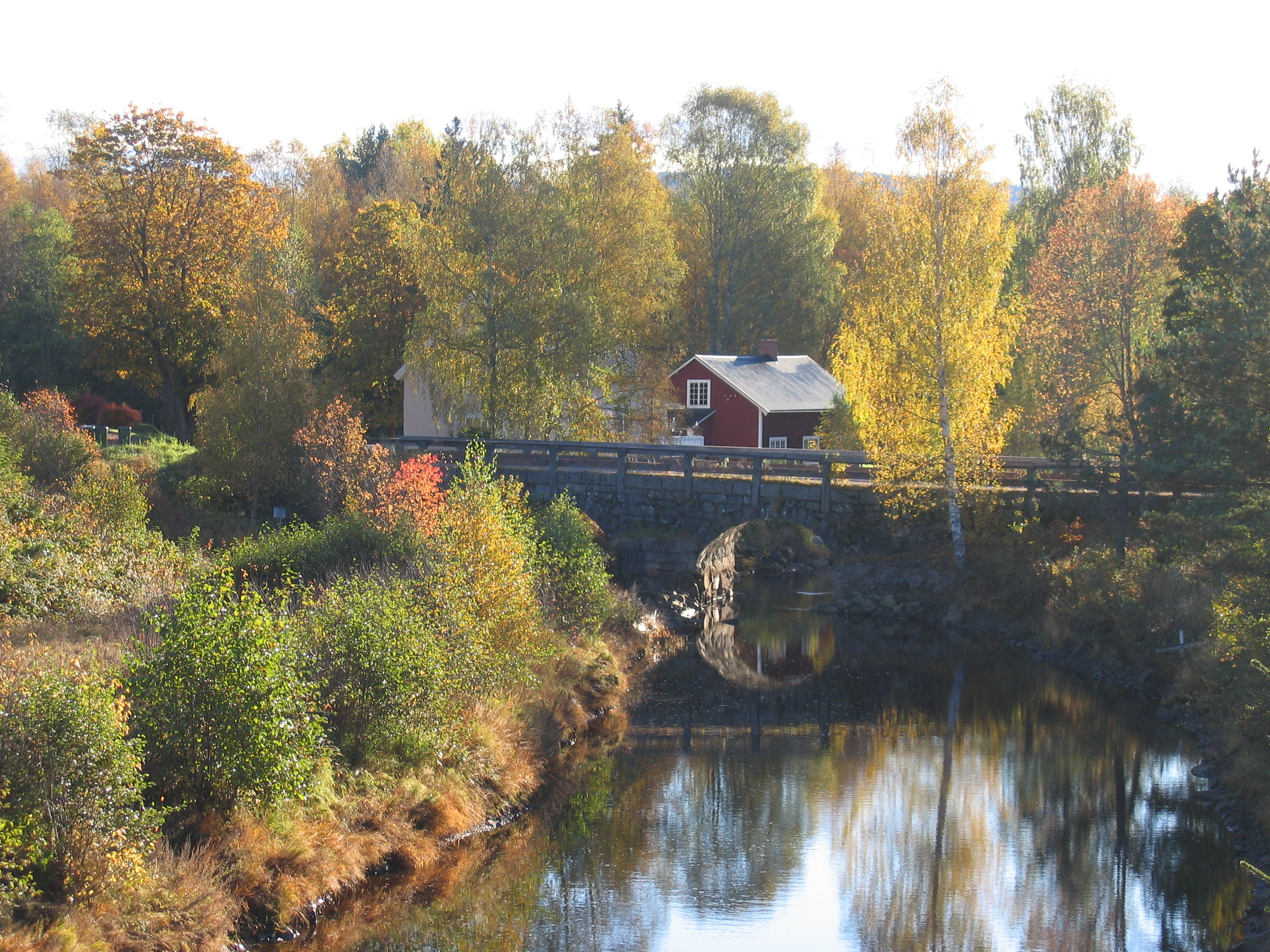 gamla kyrkbron i Östmark